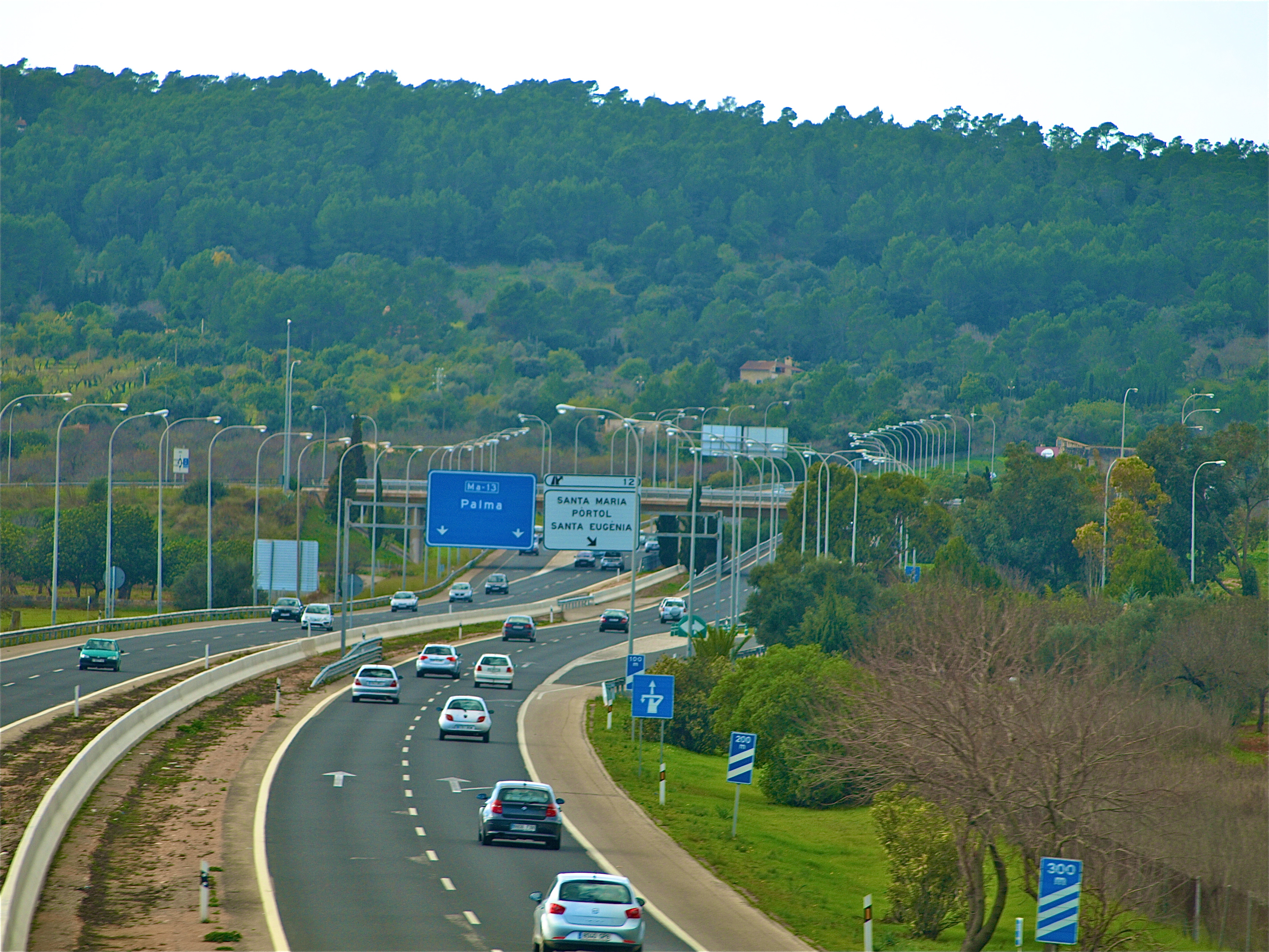 Ma-13 exit at Santa Maria